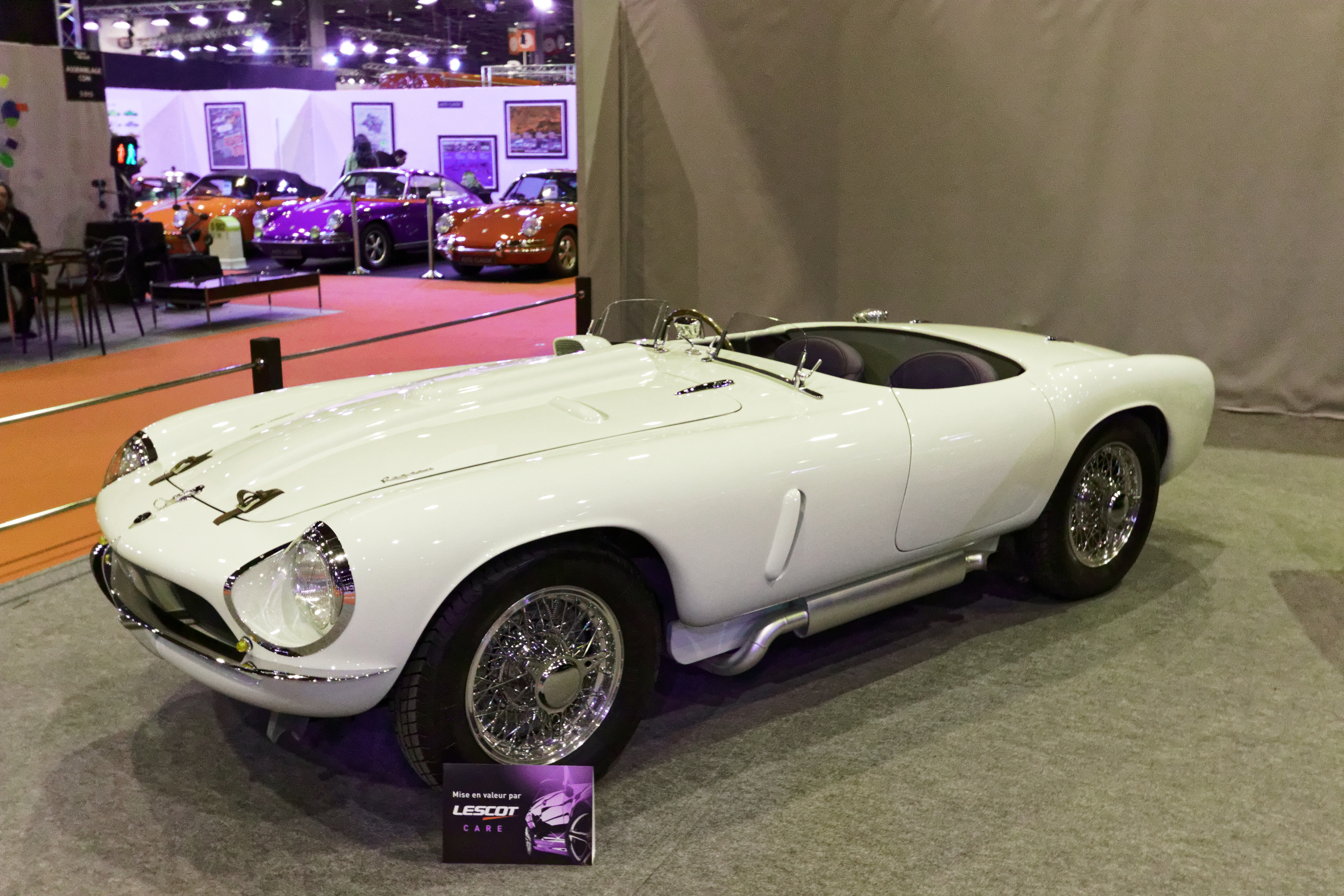 Une des voiture présentée lors du salon Rétromobile de Paris 2015